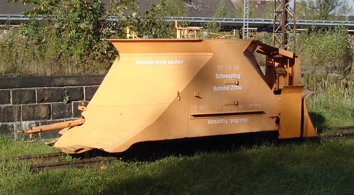 Schneepflug 97-09-58 in Zittau; Schneepflug Baujahr 1917, eingesetzt bis 1978 auf der Schmalspurbahn Wilkau-Haßlau–Carlsfeld, bis 1988 auf der Schmalspurbahn Cranzah-Kurort Oberwiesenthal, seit 1988 auf der Schmalspurbahn Zittau–Kurort Oybin/Kurort Jonsdorf